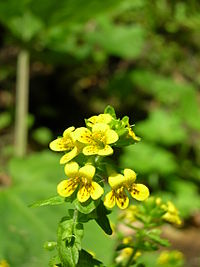 Tozzia alpina L. subsp. alpina, Parco nazionale delle Foreste Casentinesi, Monte Falterona e Campigna.